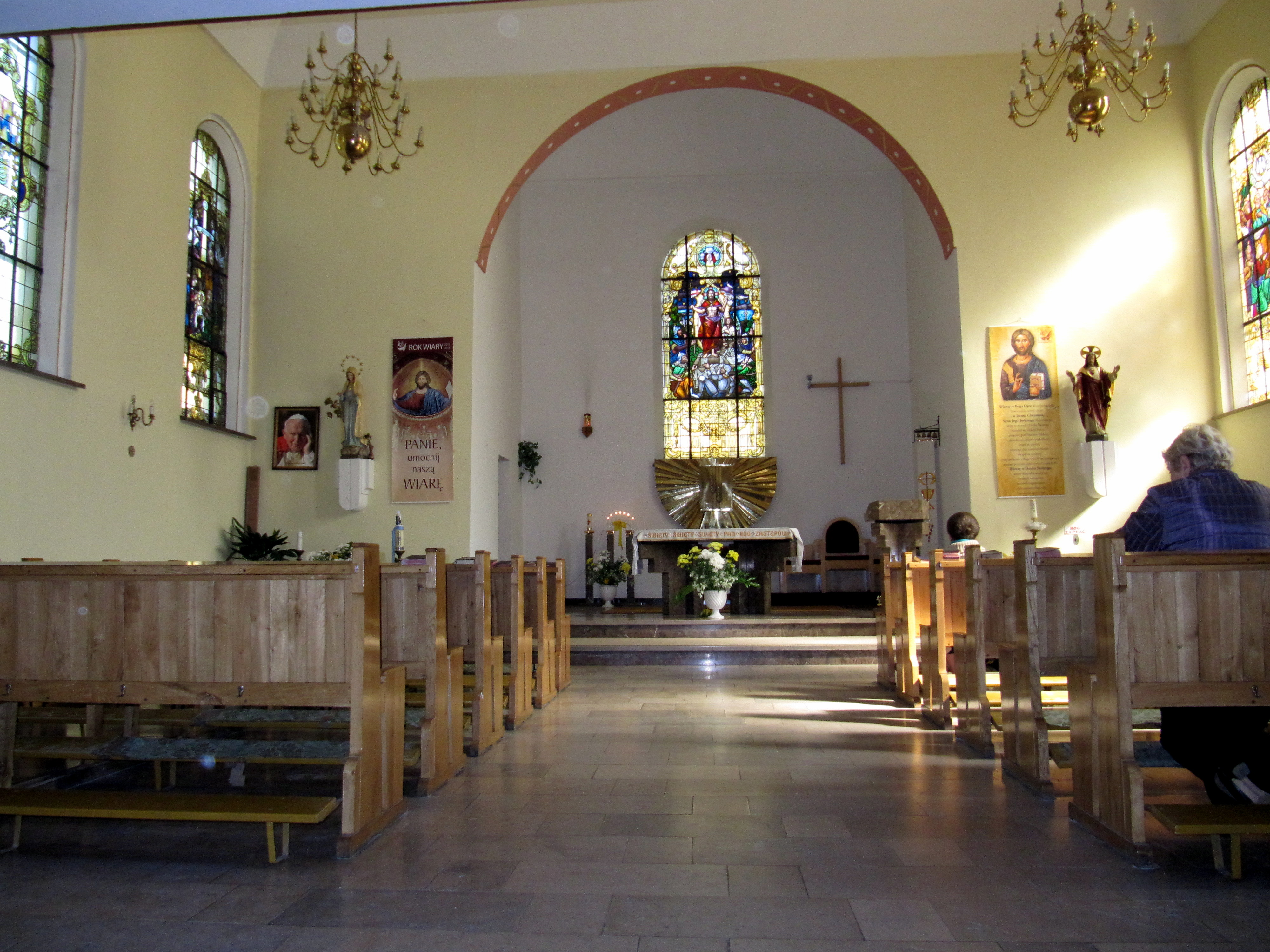 Strzelce Opolskie, kościół ewangelicki, ob. rzym.-kat. pw. Bożego Ciała, 1825, 1888